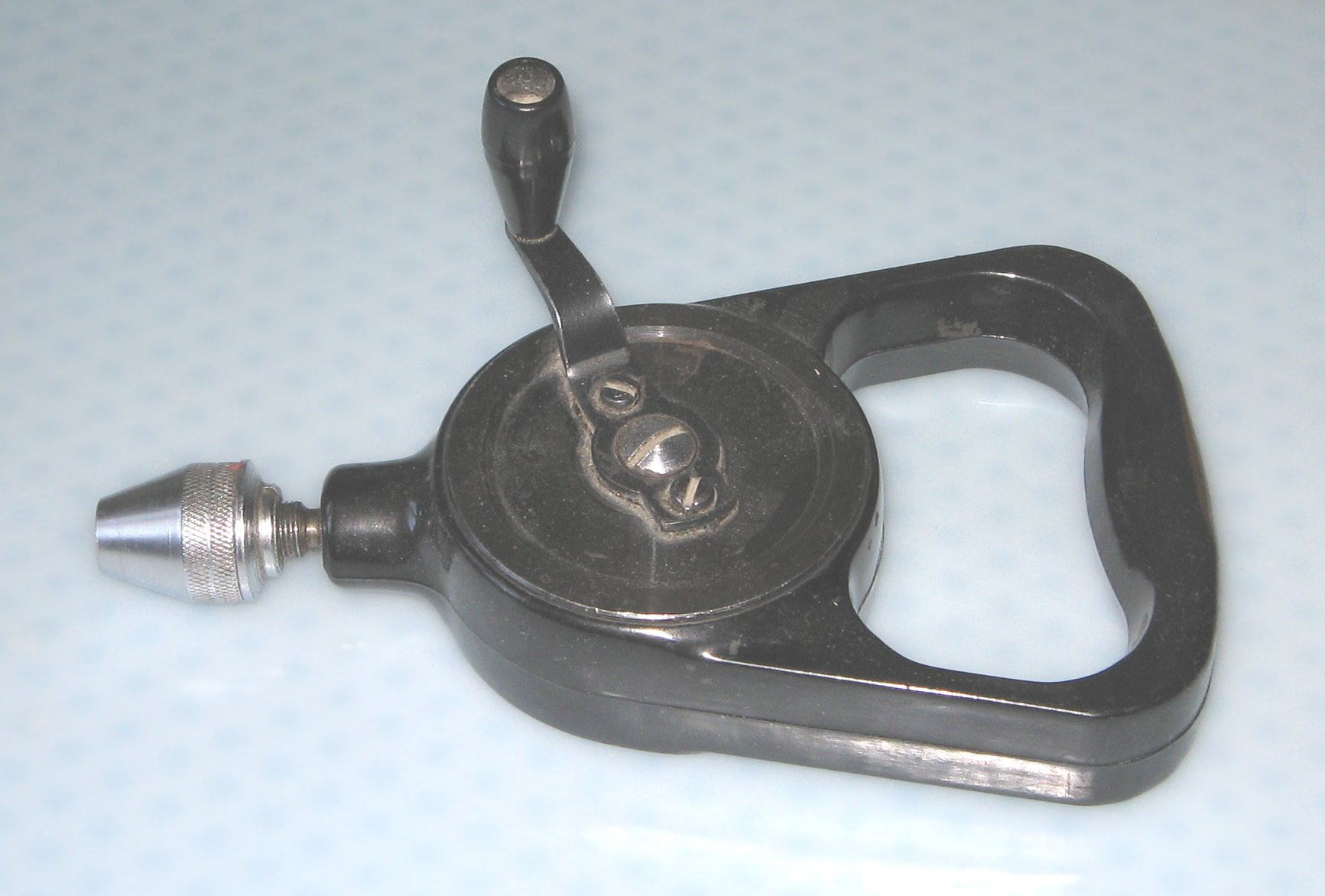 Permana drilo La foto estis farita de mi mem.